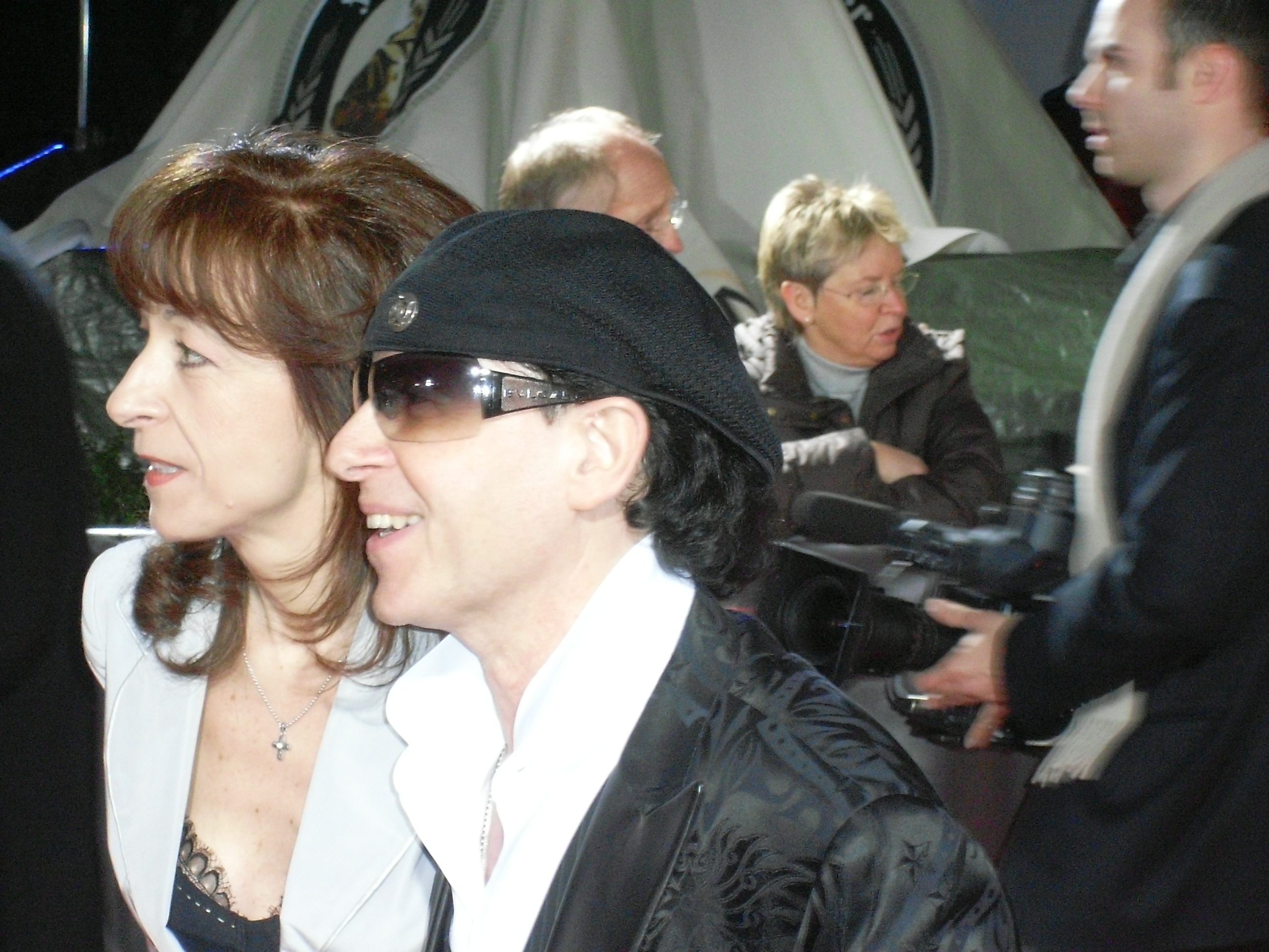 Klaus Meine at Diva 2008